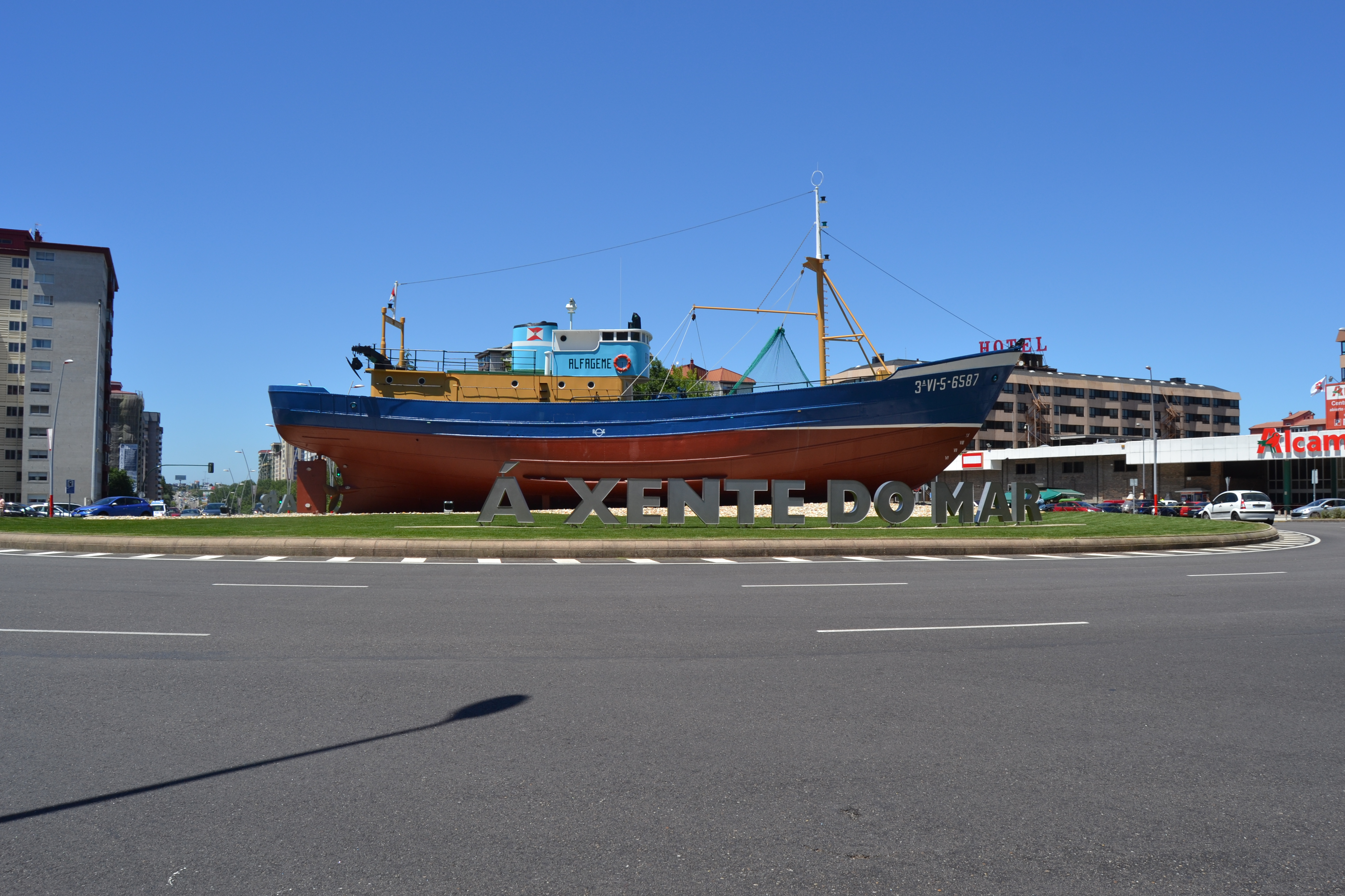 Barco Alfageme na rotonda de Coia, Vigo